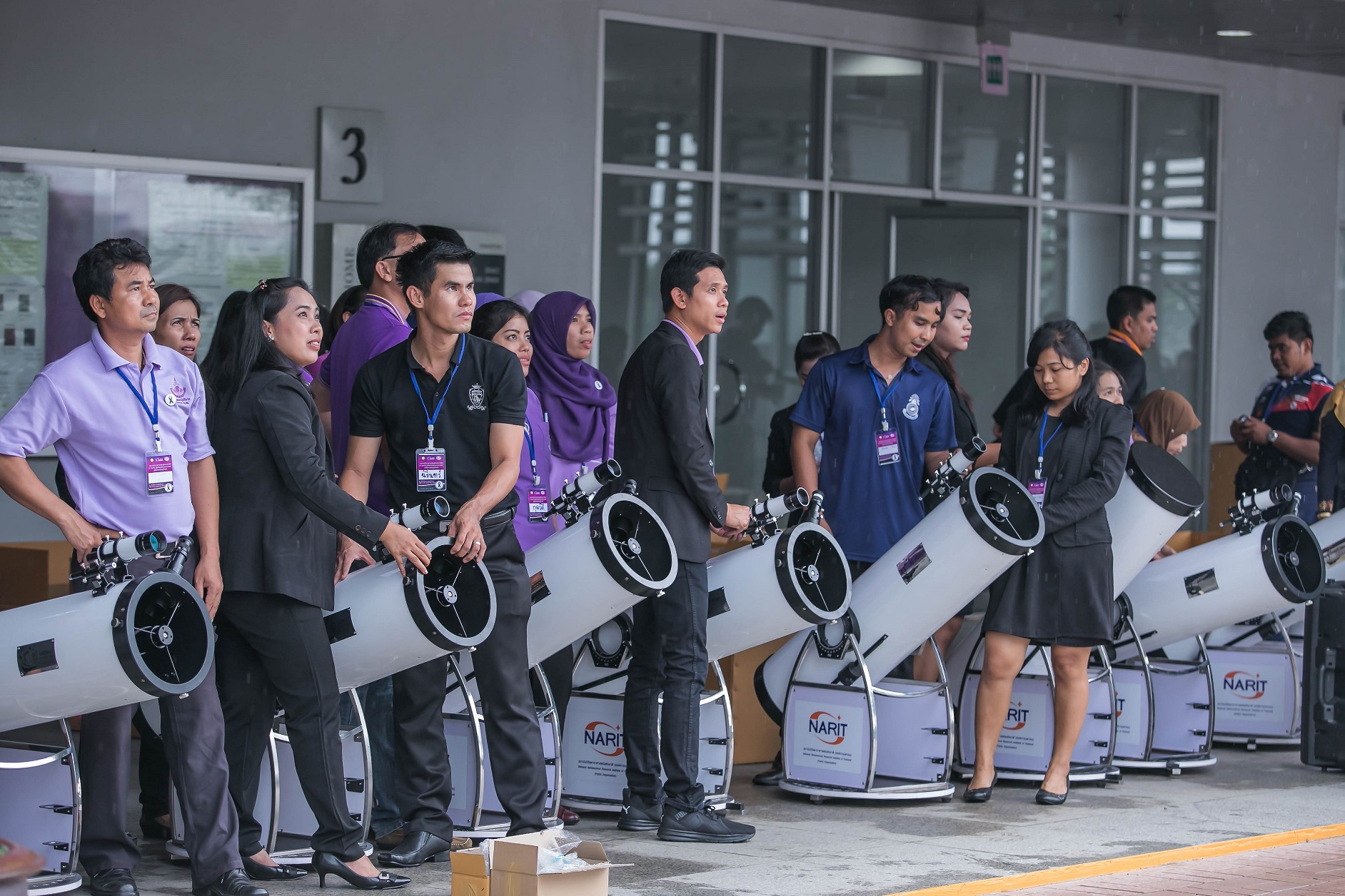 การฝึกปฏิบัติการใช้กล้องโทรทรรศน์ดอปโซเนียน หนึ่งในกิจกรรมของโครงการกระจายโอกาสการเรียนรู้ดาราศาสตร์ 77 จังหวัด เปิดฟ้าส่องโลกดาราศาสตร์ เปิดโอกาสเรียนรู้ทั่วหล้า